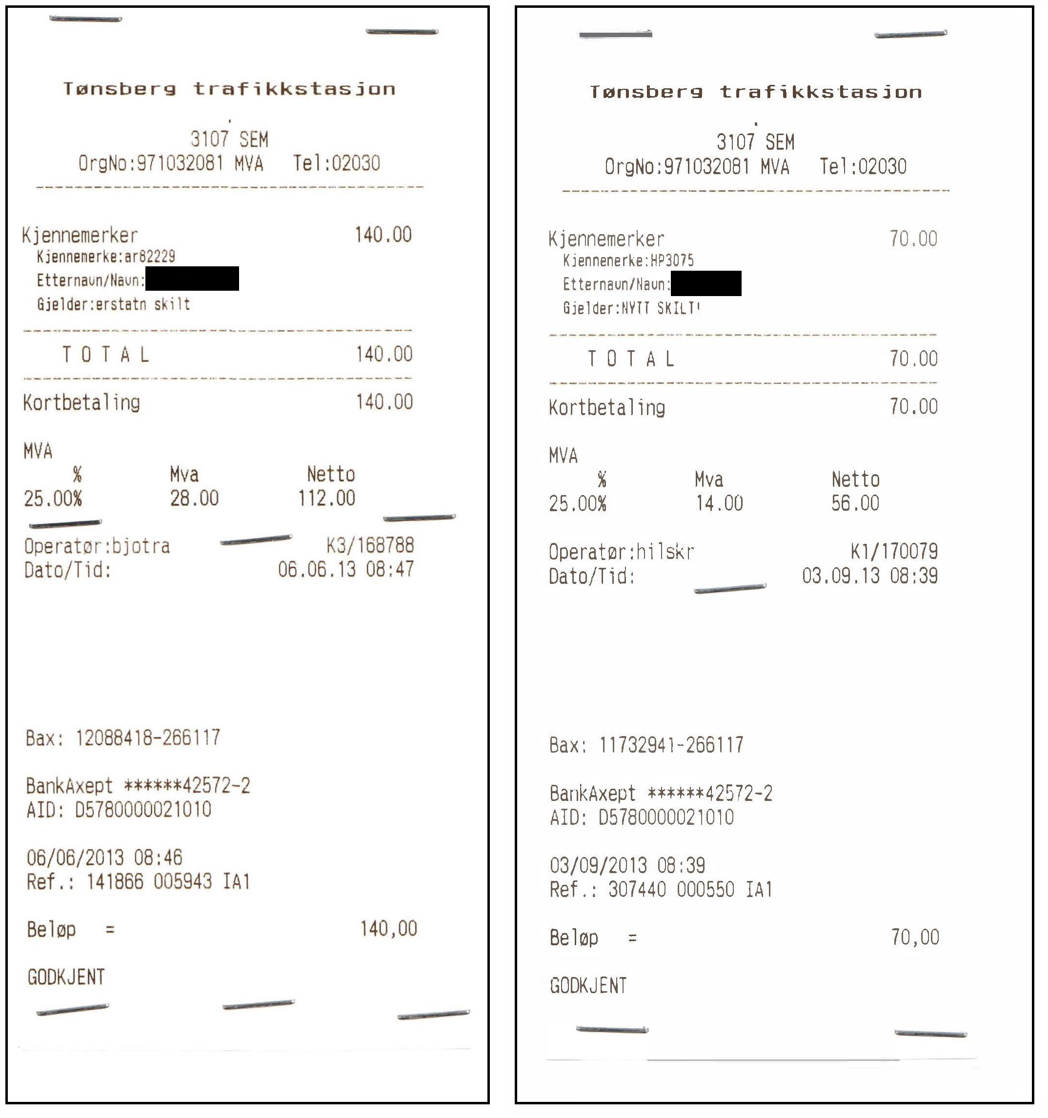 Kvittering for skit til bil og tilhenger. 140,- for bilskilt og halv pris for tilhenger.